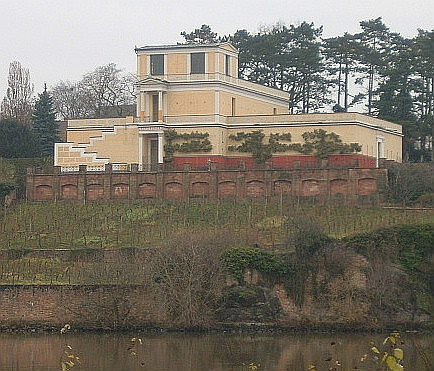 selbst fotografiert am 28.11. GNU FDL,, Bild: Pompejanum in Aschaffenburg, fotografiert von der anderen Leiderer Mainseite aus in Höhe des Stadtbades. The Pompejanum is a building in Aschaffenburg in the style of Pompeji LIZENZ